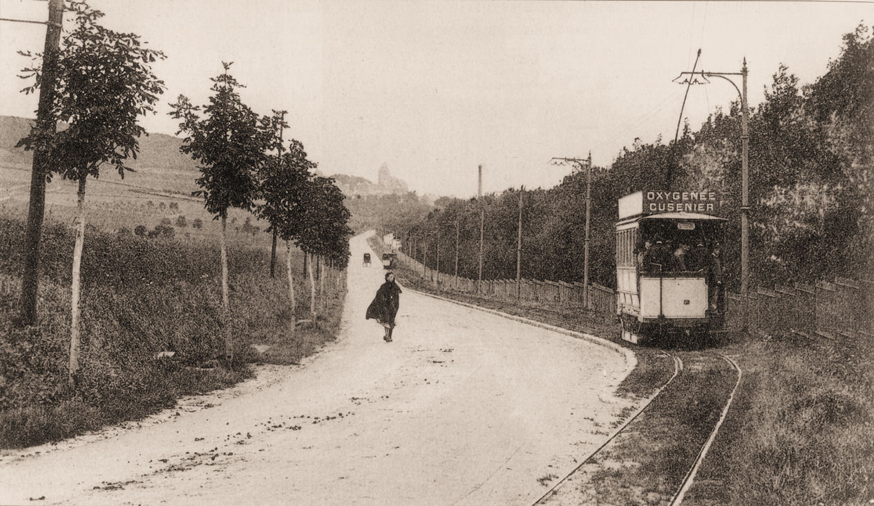 Le tramway d'Eu-Le Tréport - Le croisement de 2 motrices à la limite des 2 communes